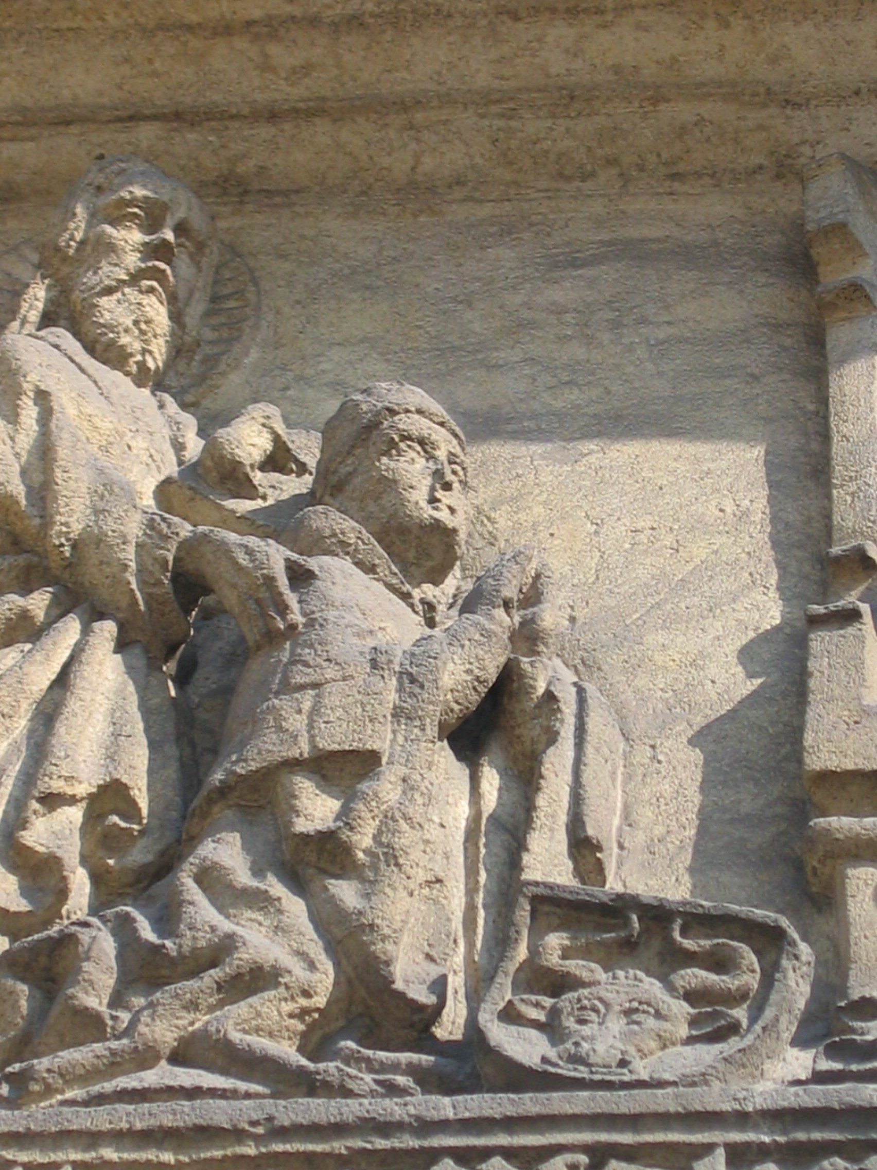 Jan Długosz na tablicy erekcyjnej w Krakowie photo by User:Mathiasrex Maciej Szczepańczyk